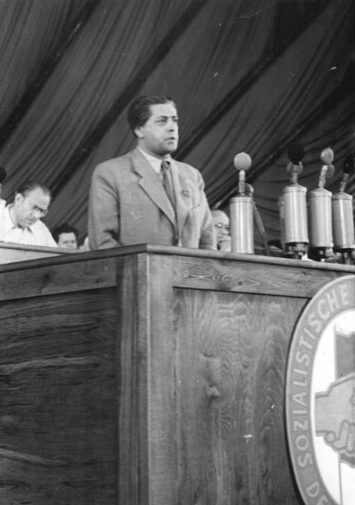 III.Parteitag der SED vom 20.-22.7.1950. Vom 20.-22.7.1950 findet in Berlin in der Werner-Seelenbinderhalle der III.Parteitag der Sozialistischen Einheitspartei Deutschlands statt. UBz: Während der Diskussionsrede von Joseph Frank, stellvertr. Generalsekretär der KPTsch. Aufn.; Illus-Quaschinsky 81 7294-50 22.7.50 do